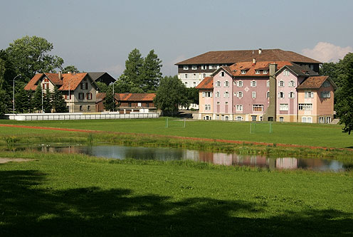 Institut Montana auf dem Zugerberg